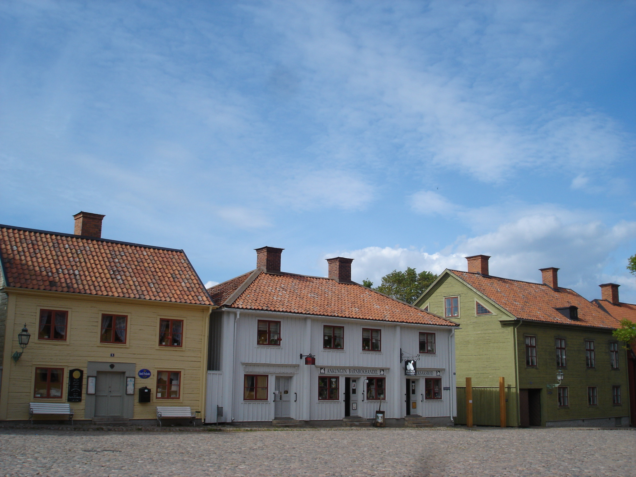 老林雪平中心广场